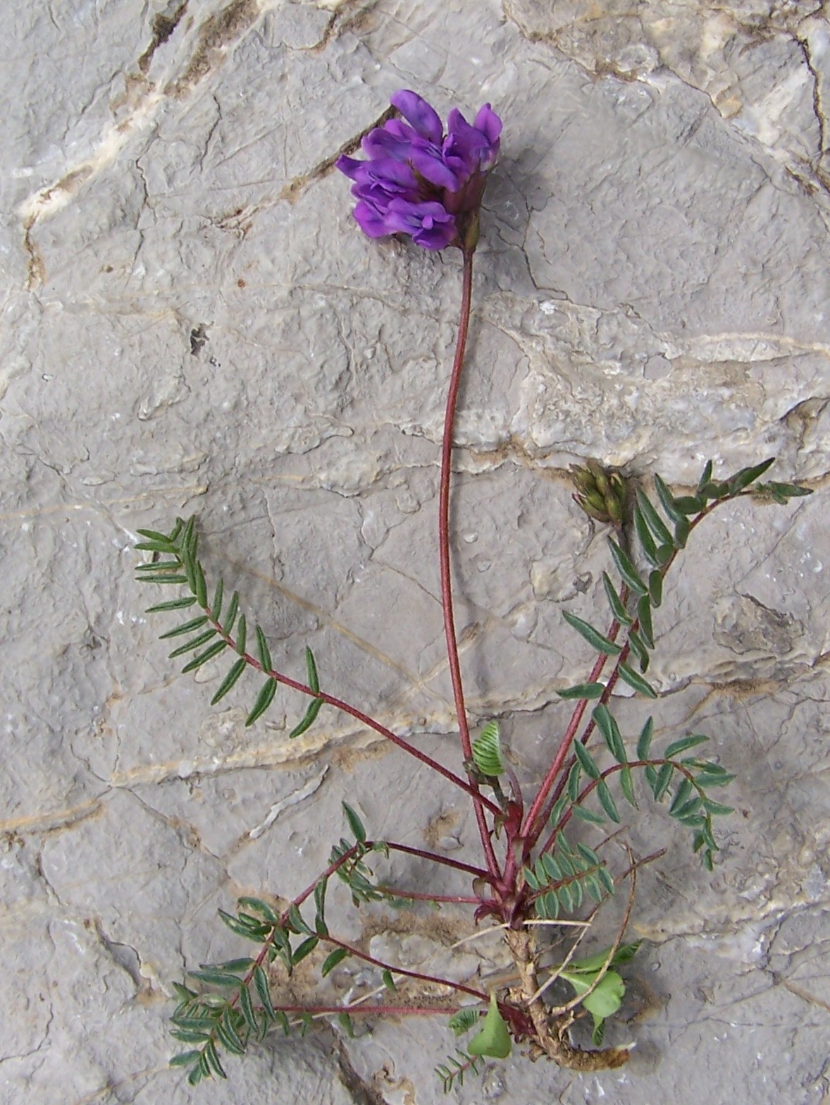 Oxytropis carpatica (pl. ostrołódka karpacka), habitat: West Tatra Mountains, Małołączniak, Czerwony Grzbiet